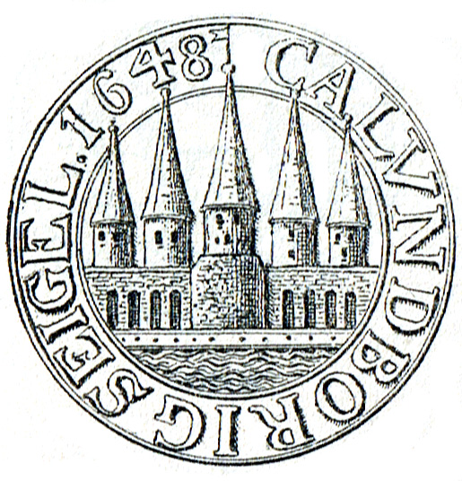 Kalundborgs Segl fra 1648